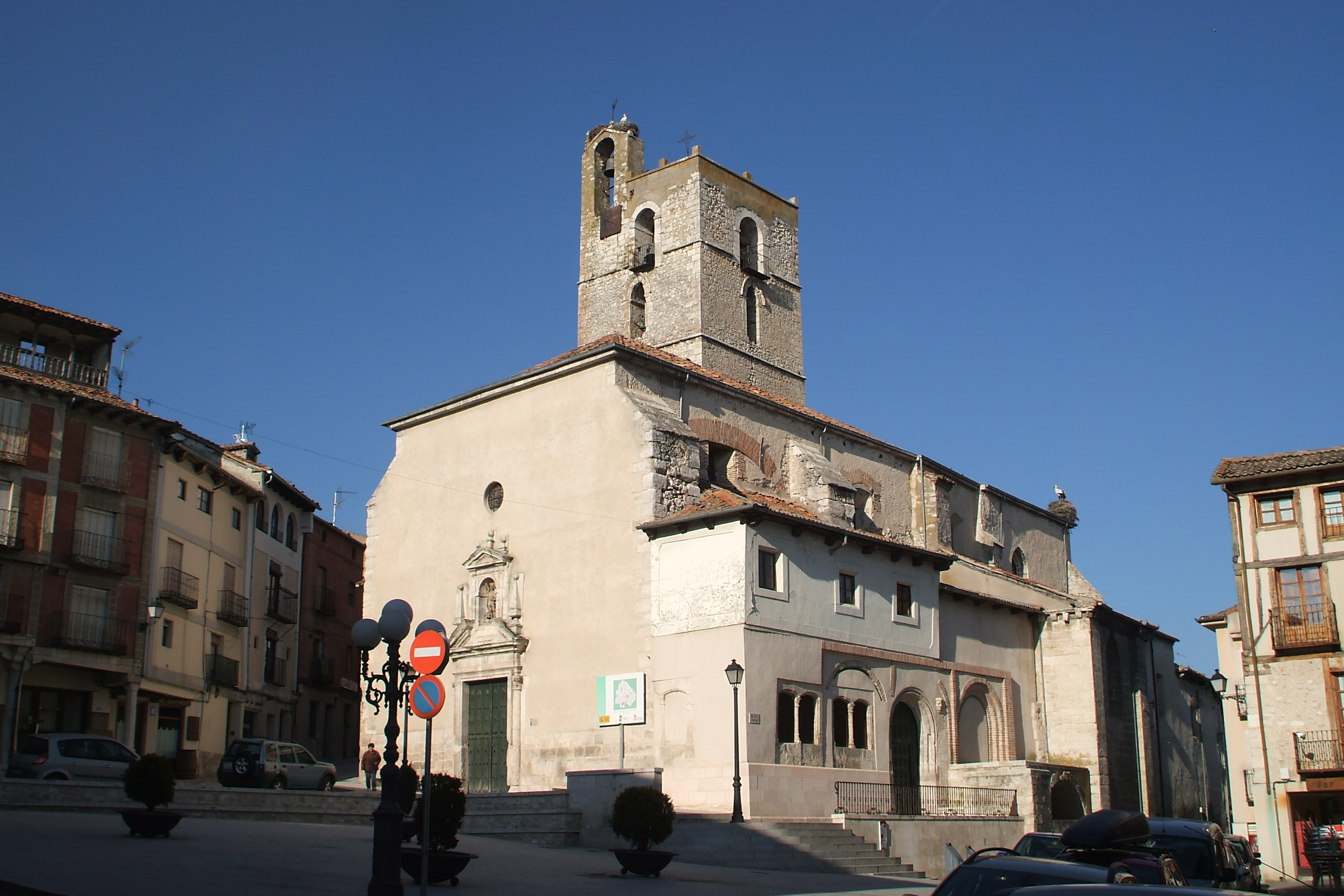 Iglesia de San Miguel (Cuéllar)